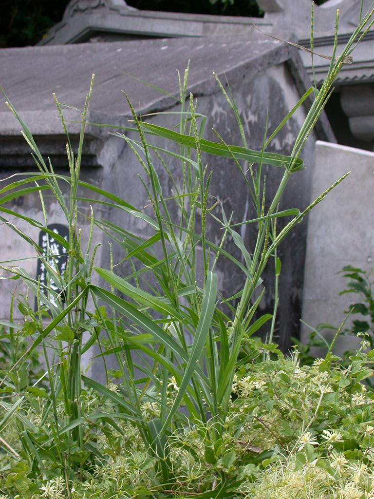 ツノアイアシ：Rottbellia cochinchinensis 沖縄本島中部恩納村 2006.08.11